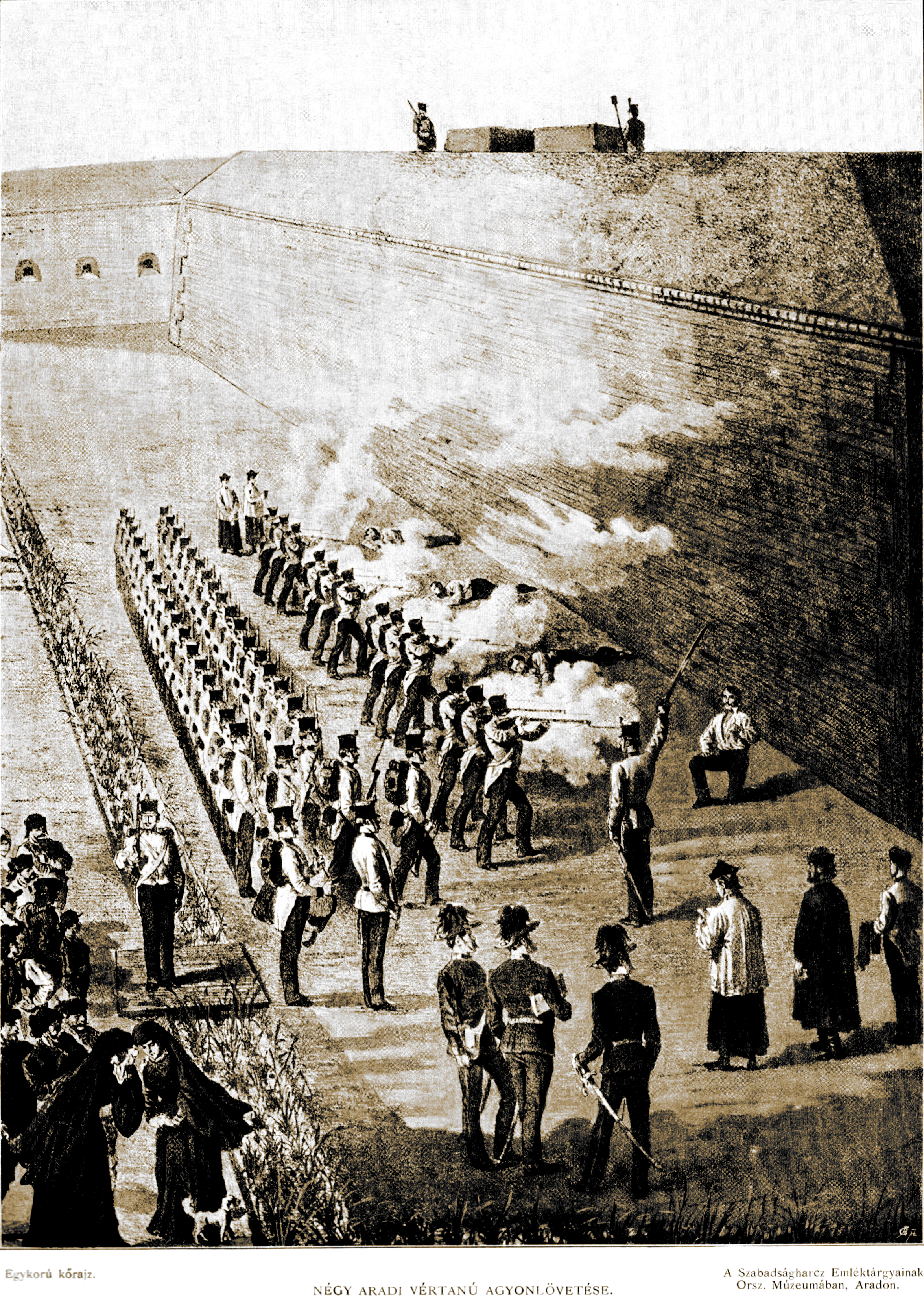 Négy aradi vértanú agyonlövetése az aradi várárokban Lőpor és golyó általi halállal halt (reggel fél hatkor): Lázár Vilmos főtiszt (ezredes), Dessewffy Arisztid tábornok, Kiss Ernő tábornok, Schweidel József tábornok. 12 katona állt fel velük szemben töltött fegyverrel, parancsnokuk kardjával intett és a lövések eldördültek. Kiss Ernő kivételével mindhárman élettelenül buktak a földre. Kiss Ernőt csak a vállán érte a lövés, ezért három katona közvetlenül elé állt, és mindhárman újra tüzeltek.